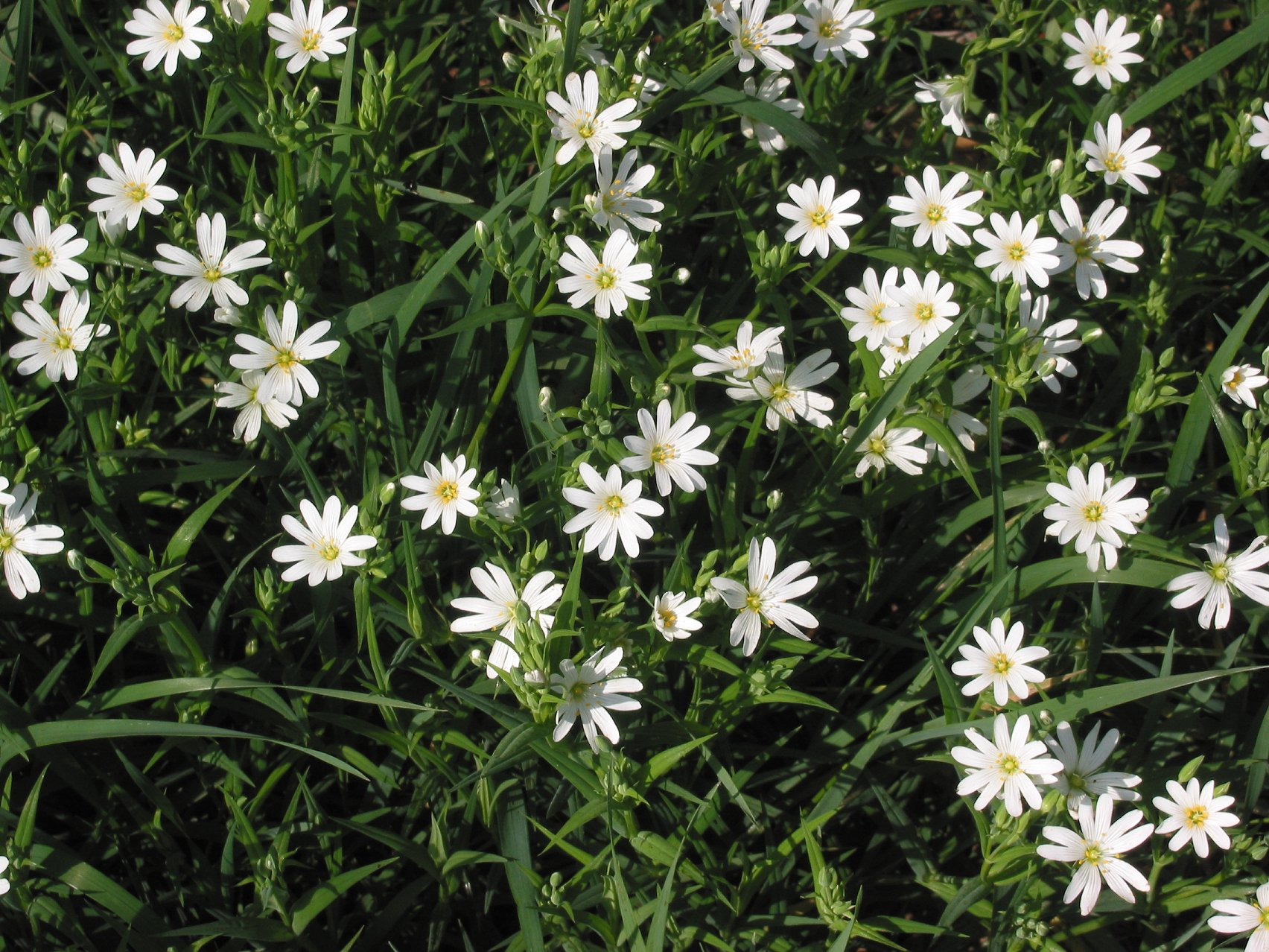 Stellaria holostea (Grote muur)